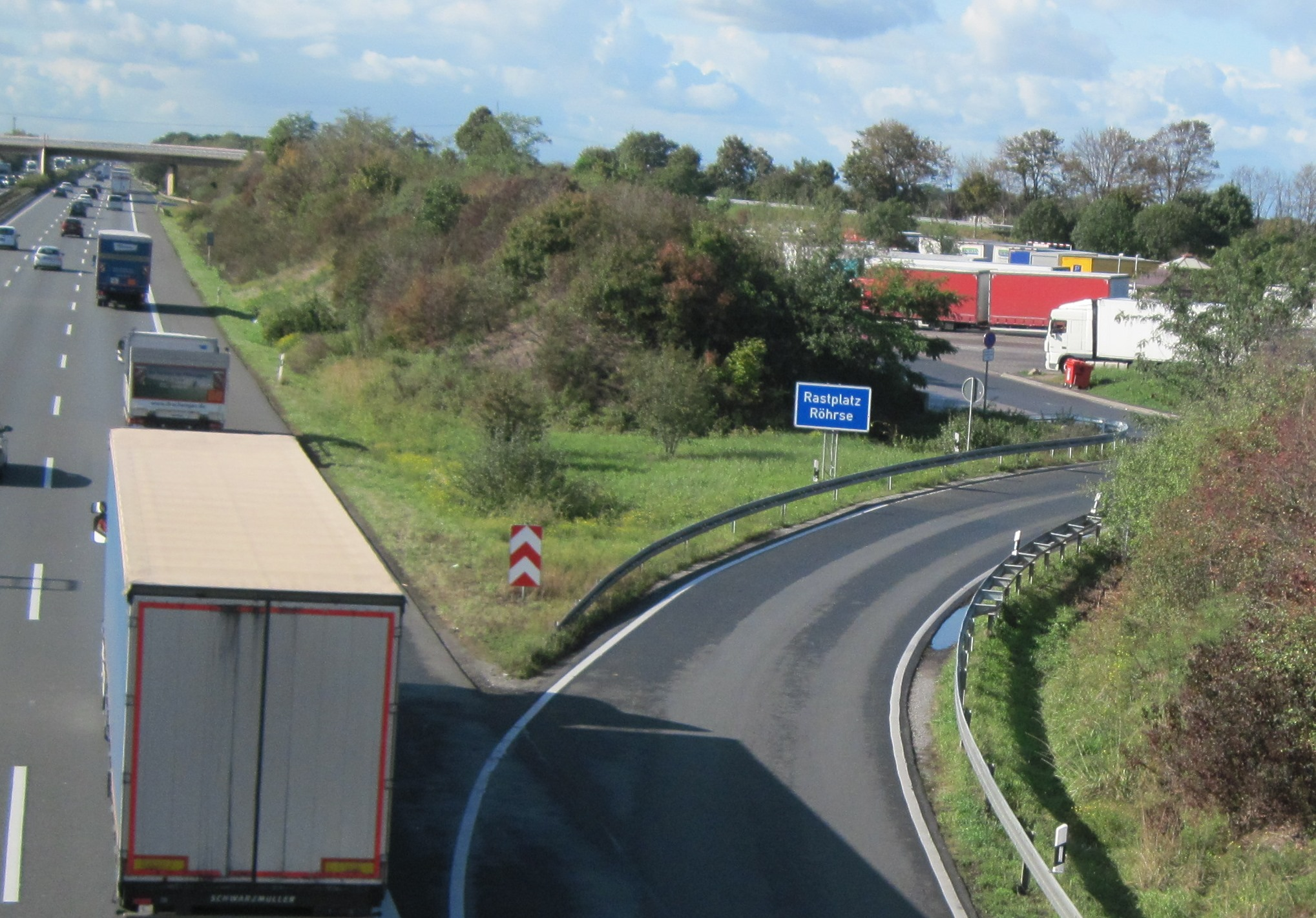 Die direkt am Ort gelegenen Autobahnparkplätze der BAB 2 sind sowohl auf der Nord- wie auch auf der Südbahn als "Rastplatz Röhrse" benannt. Hier die Ausfahrt zum Rastplatz an der Nordbahn in Fahrtrichtung Hannover